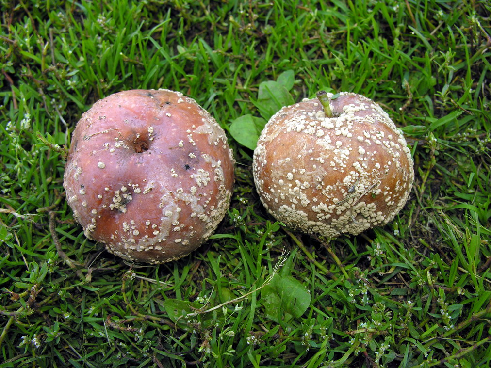 Sodinė monilija (Monilia fructigena) Foto: Algirdas, 2006 m. rugpjūčio 24 d., Lietuva